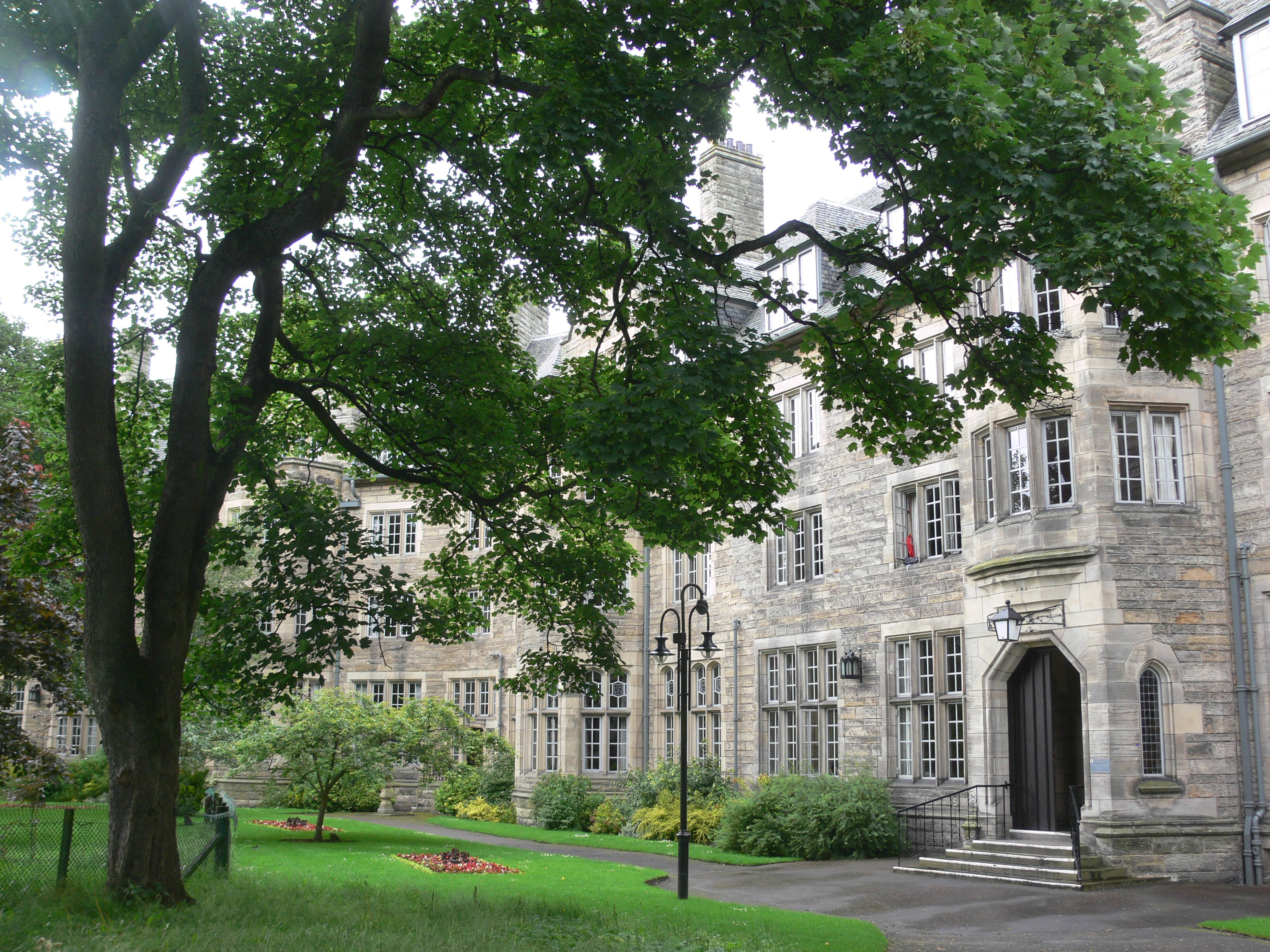 St Andrews - St Salvator's Hall